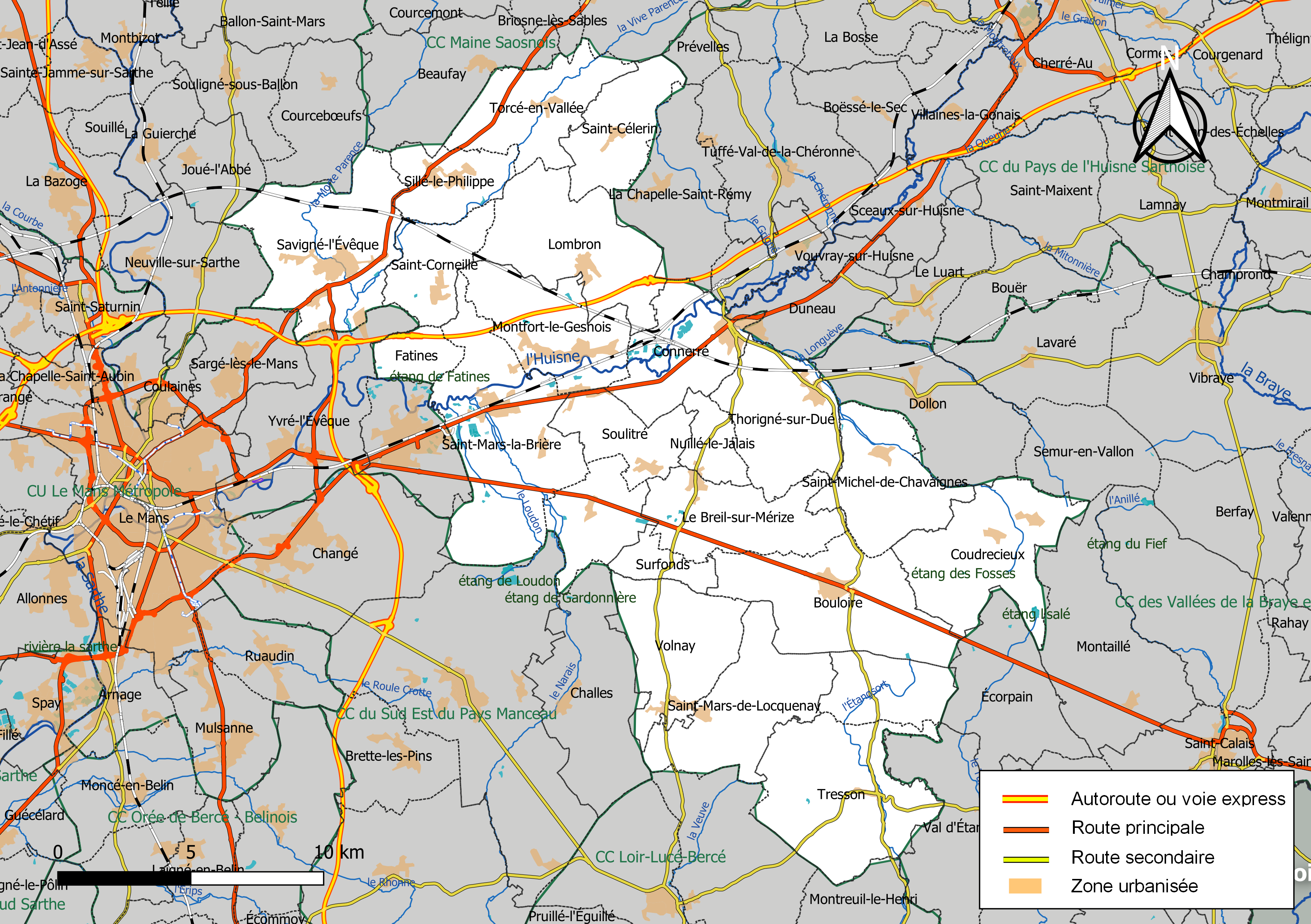 Carte géographique de la Communauté de communes Le Gesnois Bilurien, département de la Sarthe, France. Composition au 1er janvier 2019.